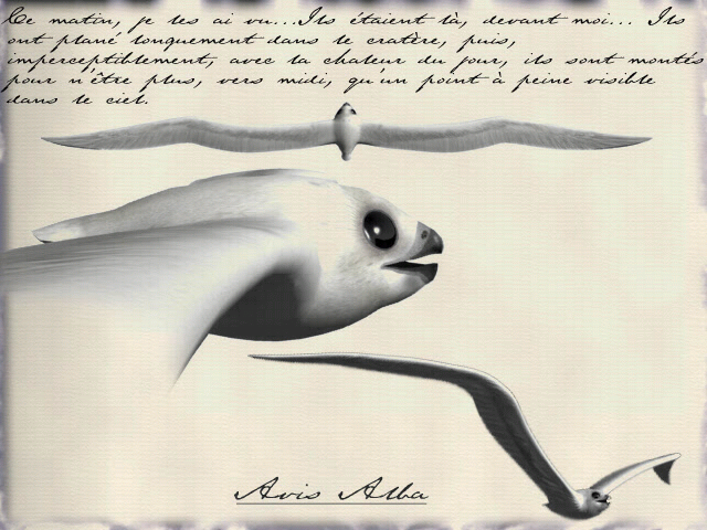 Capture d'écran du jeu vidéo L'Amerzone (1999), développé et édité par Microïds.